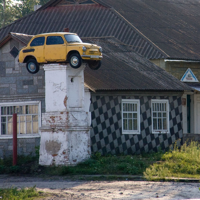 Фото сделано мною